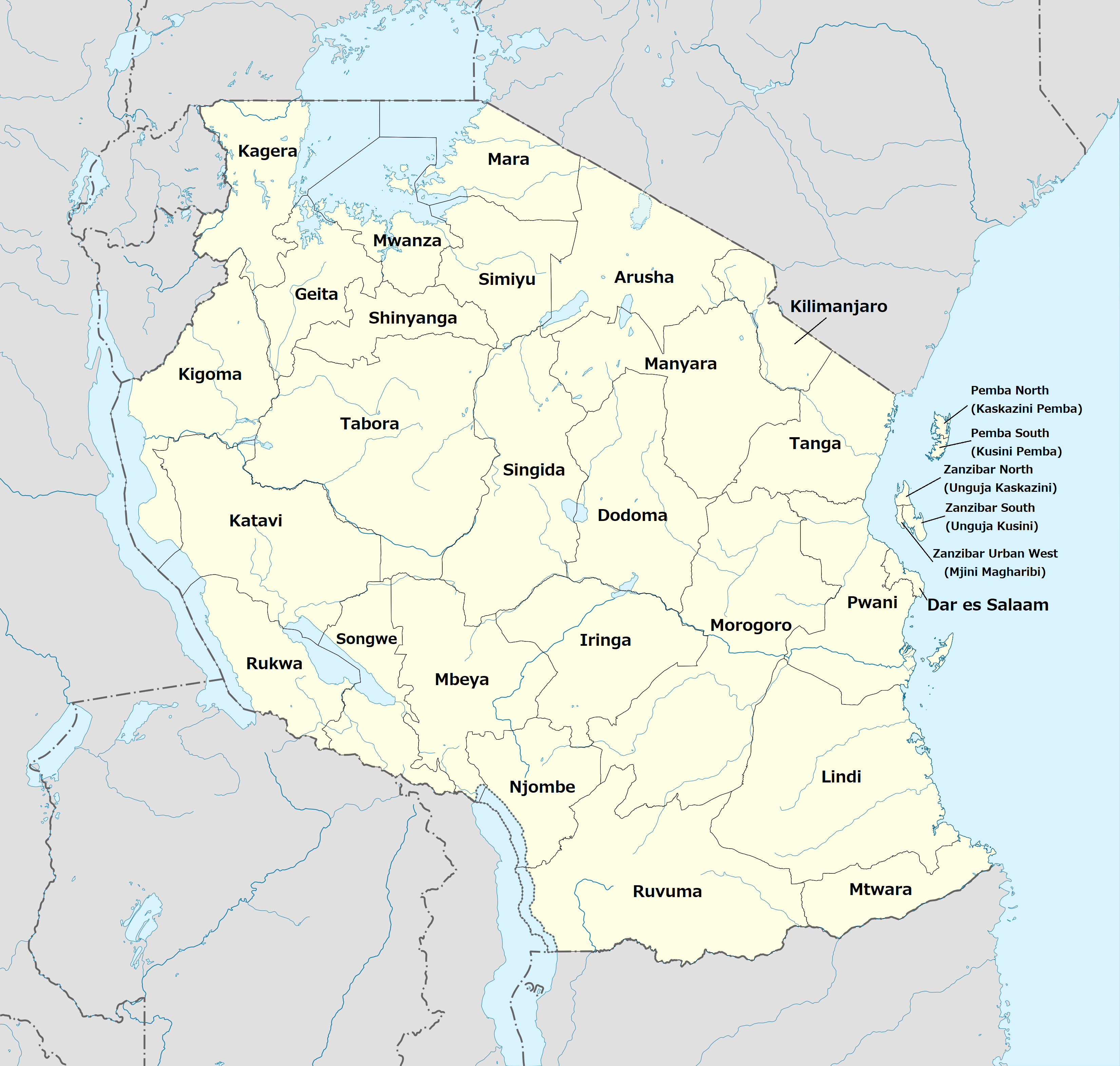 タンザニアの州の地図（2016年、ソングウェ州追加版）